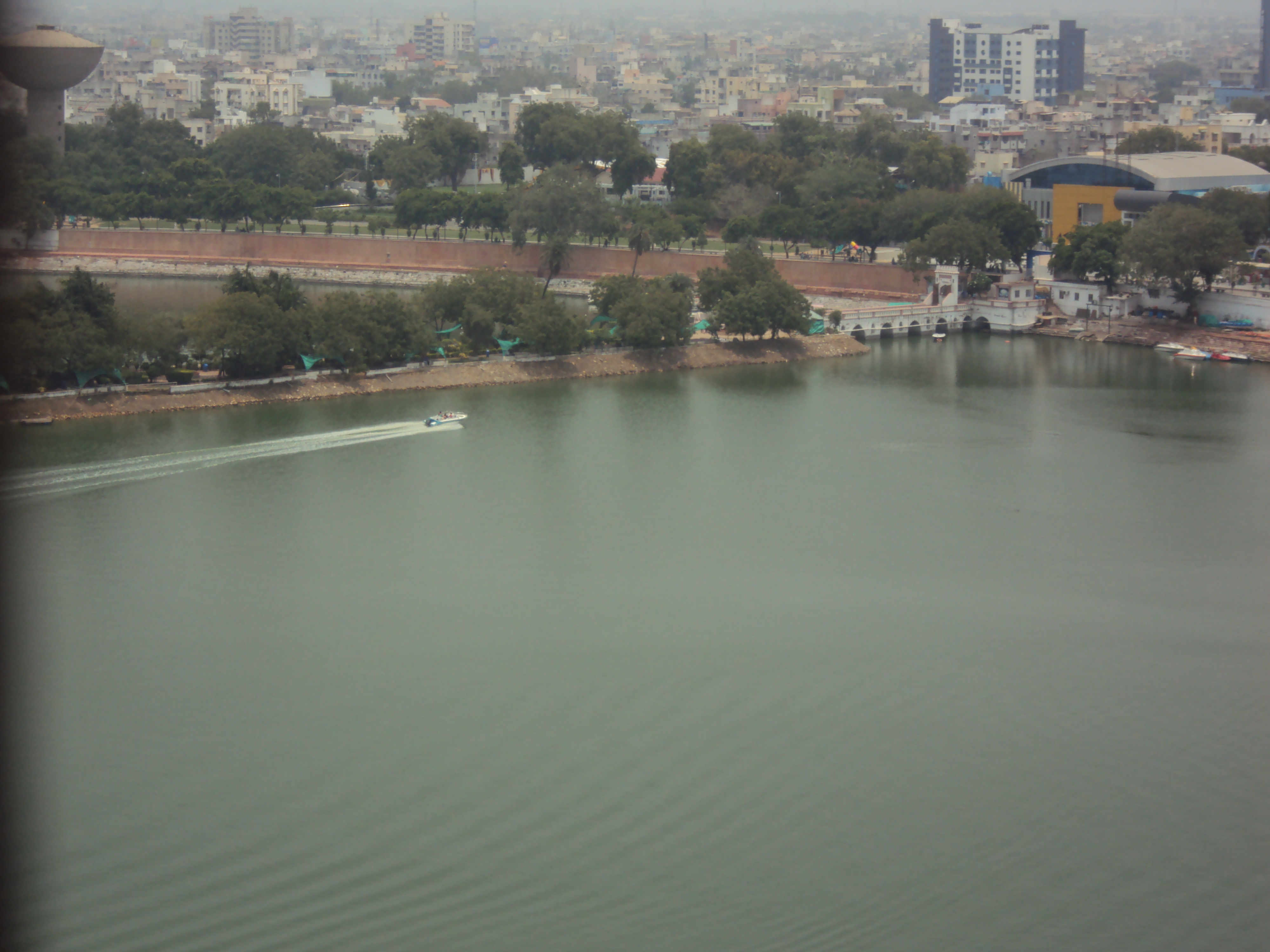 Kankariya lake from helium baloon near it